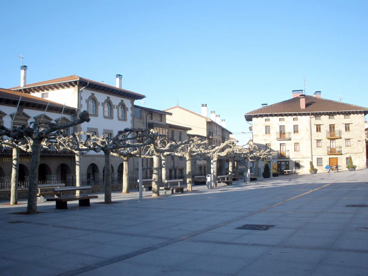 Legutio (Álava)